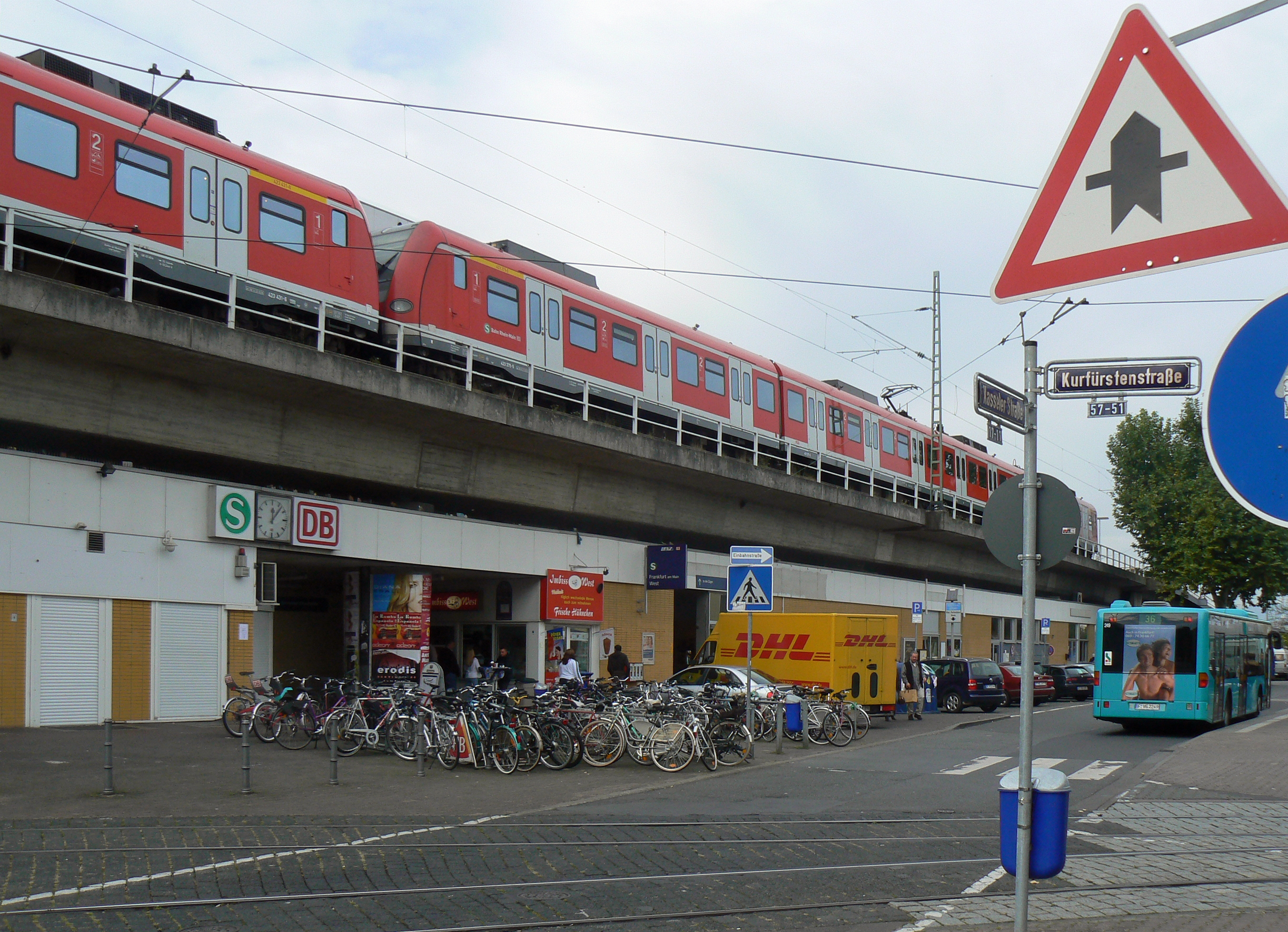 Westbahnhof, Frankfurt Bockenheim. Der Bahnhof Frankfurt (Main) West ist ein Regional- und S-Bahnhof an der Main-Weser-Bahn im Westen der Innenstadt von Frankfurt am Main, im Stadtteil Bockenheim, nahe der Messe Frankfurt und dem Campus Bockenheim der Johann Wolfgang Goethe-Universität Frankfurt am Main. 1845 verständigten sich Kurhesen, das Großherzogtum Hessen-Darmstadt und die freie Reichsstadt Frankfurt am Main zum Bau der Bahn. Der Bahnhof wurde 1848 als Bahnhof Bockenheim an der Strecke der Main-Weser-Bahn (Frankfurt-Kassel) errichtet mit einem Nebengleis zu dem nahen Industriegelände in der Solmsstraße und einem weiteren Nebengleis bis zur Bockenheimer Warte. Die damals noch selbständige Stadt Bockenheim lag bis 1866 auf kurhessischem Territorium. Sie war im Rahmen des Kurfürstentums bedeutend und ihr Bahnhof wurde nach einem Entwurf von Julius Eugen Ruhl mit einem relativ aufwändigen Empfangsgebäude im Stil der Neorenaissance, einschließlich eines besonderen Aufenthaltsbereichs für den Kurfürsten. Dies Gebäude wurde im 2.Weltkrieg durch Fliegerbomben zerstört.